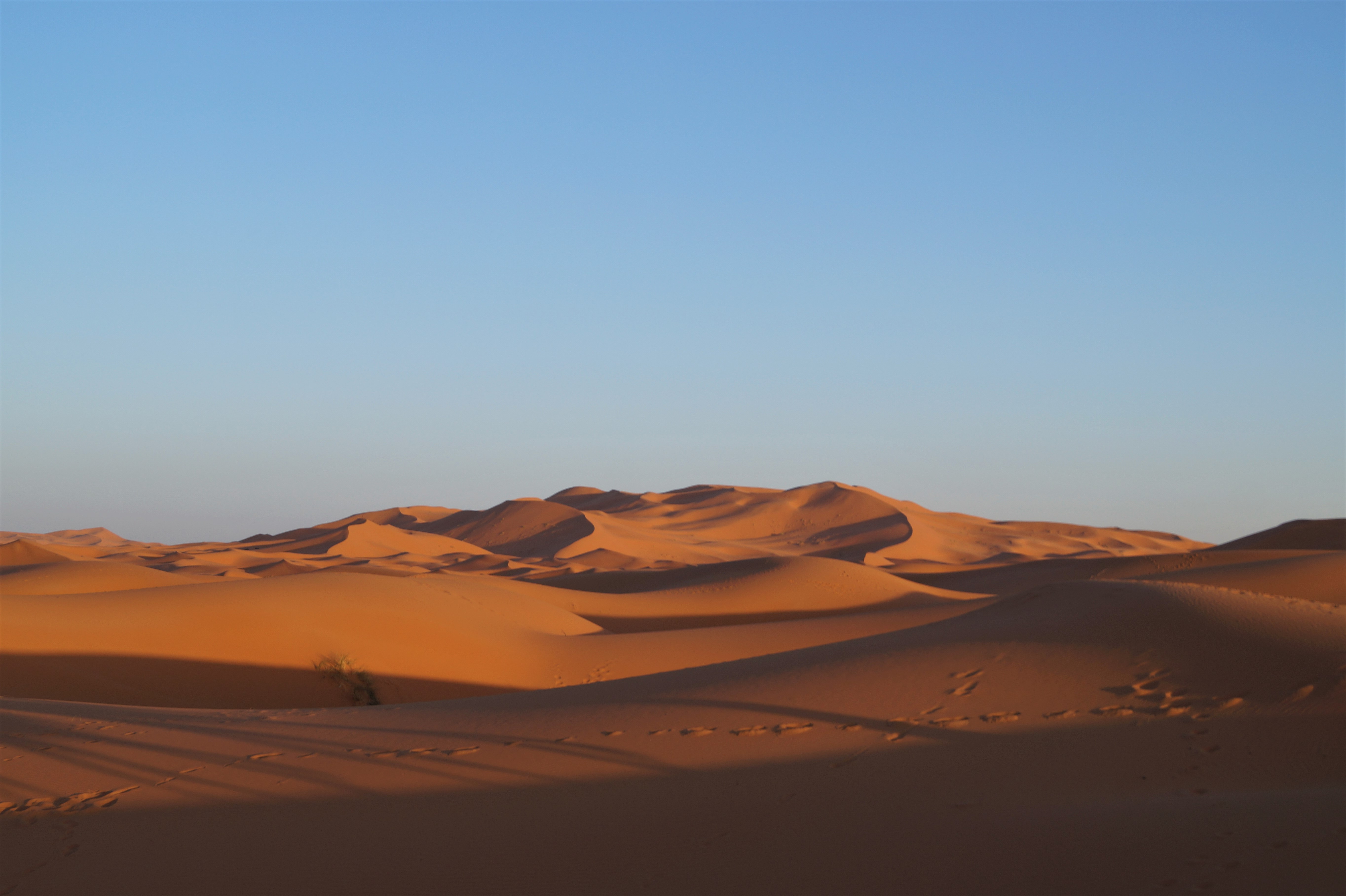 Imagen de las dunas del Sahara captada cerca de la ciudad de Merzouga, Marruecos.